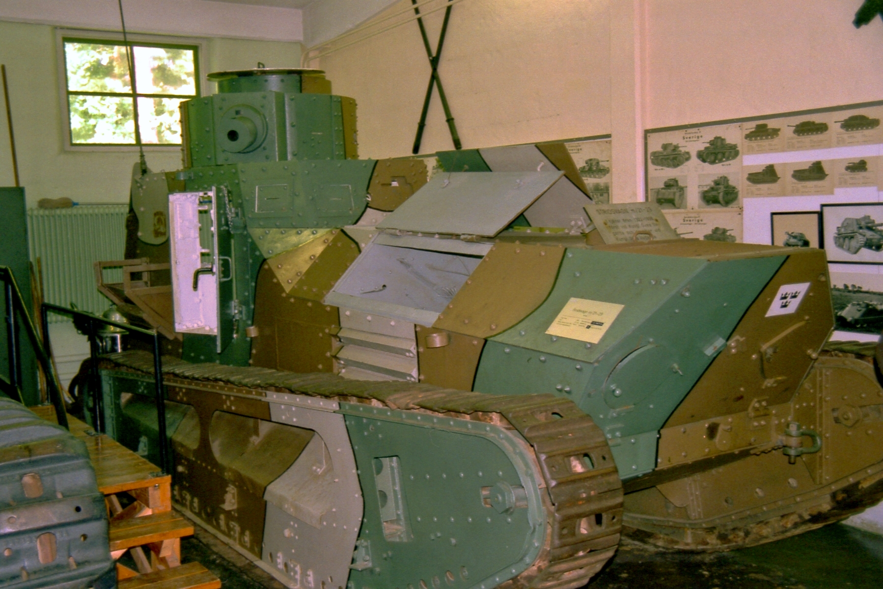 Stridsvagn m/21-29 im Panzermuseum Axvall (Schweden) am 31.05.2000